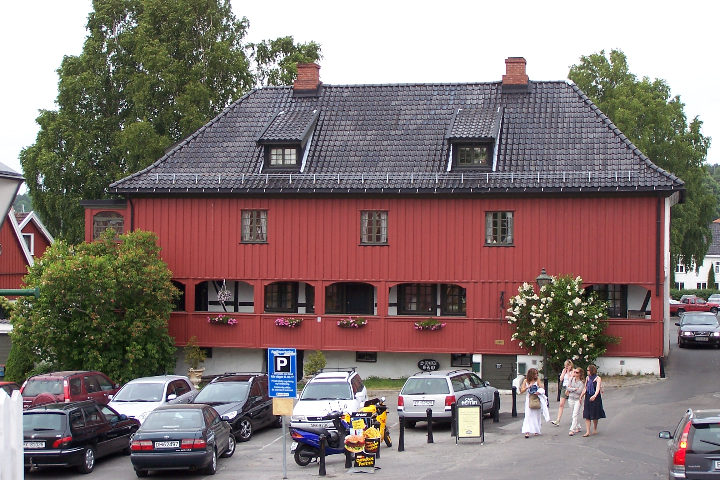 Son, Norway: Spinnerigården